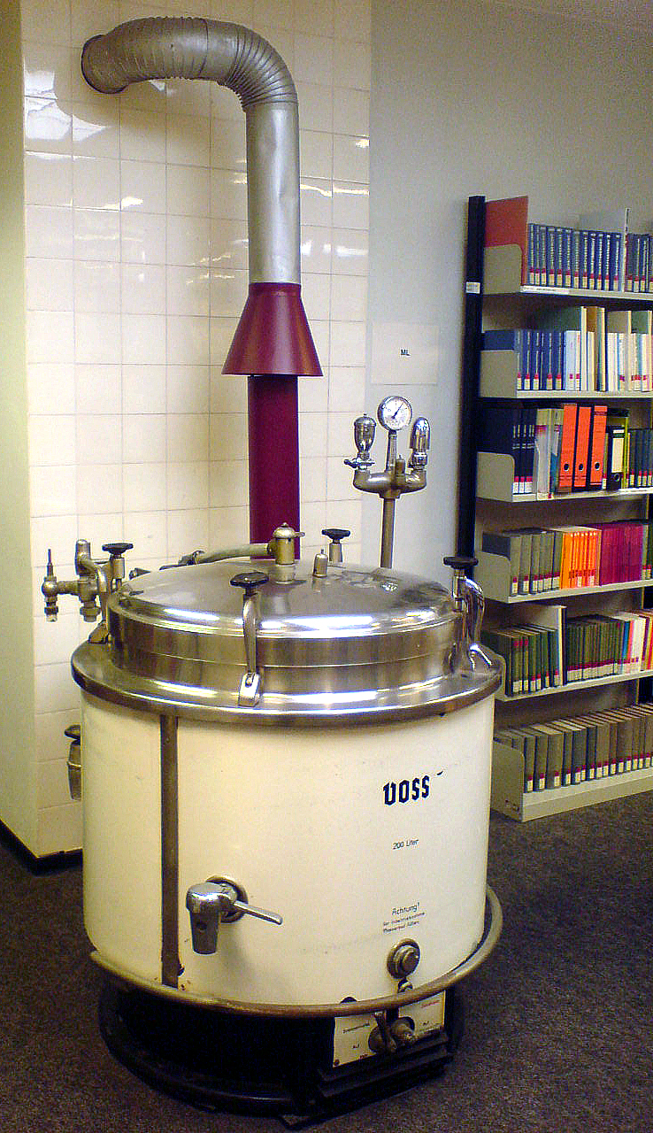 200 Liter Dampfdruckkochtopf der Firma Voss mit eigenem Ofenrohr zum Schornstein im denkmalgeschützten Theodor-Lessing-Haus in Hannover. Der Kochtopf ist ein Überbleibsel der ehemaligen Hauptmensa der Universität Hannover. An dieser Stelle findet sich heute ein Teil der Universitätsbibliothek, die Fachbibliothek Sozialwissenschaften.